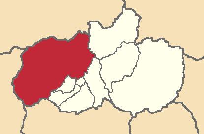 Mapa localizador del cantón en Tungurahua, Ecuador